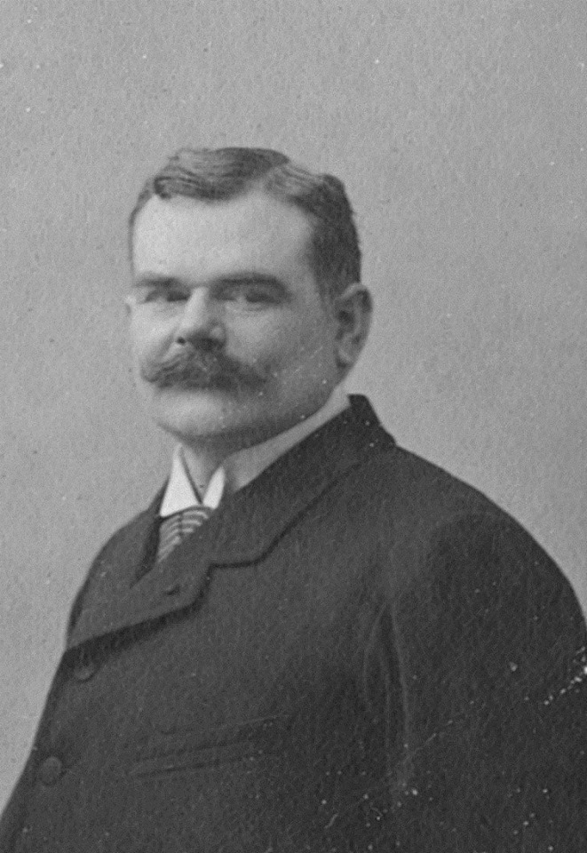 Portrait de Léopold Henri Marie Ghislain van den Steen (1860-1919)